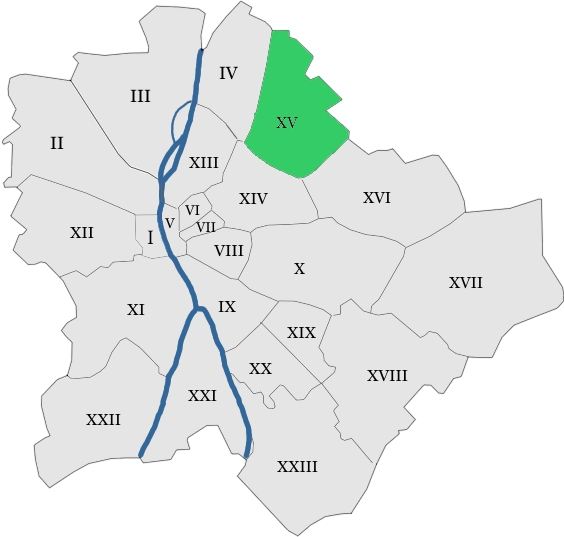 map hungary budapest district 15